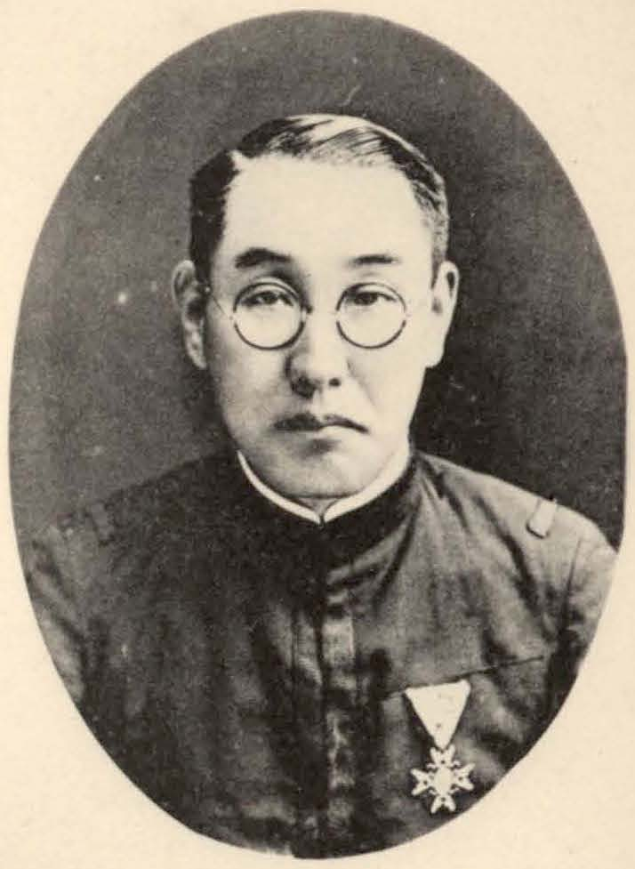 増田秀吉 Masuda Hidekichi